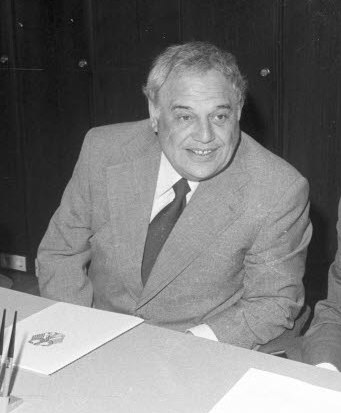 Der Rektor der Christian-Albrechts-Universität (CAU) Prof. Wilhelm Kewenig (links), der Präsident des Landesarbeitsamtes Eduard Bovensiepen (Bildmitte) und Landeskultusminister Walter Braun (rechts) unterzeichnen die Vereinbarung zur Einrichtung der neuen Berufsberatungsstelle, die bereits seit April 1974 im Verwaltungshochhaus an der Olshausenstraße untergebracht ist.